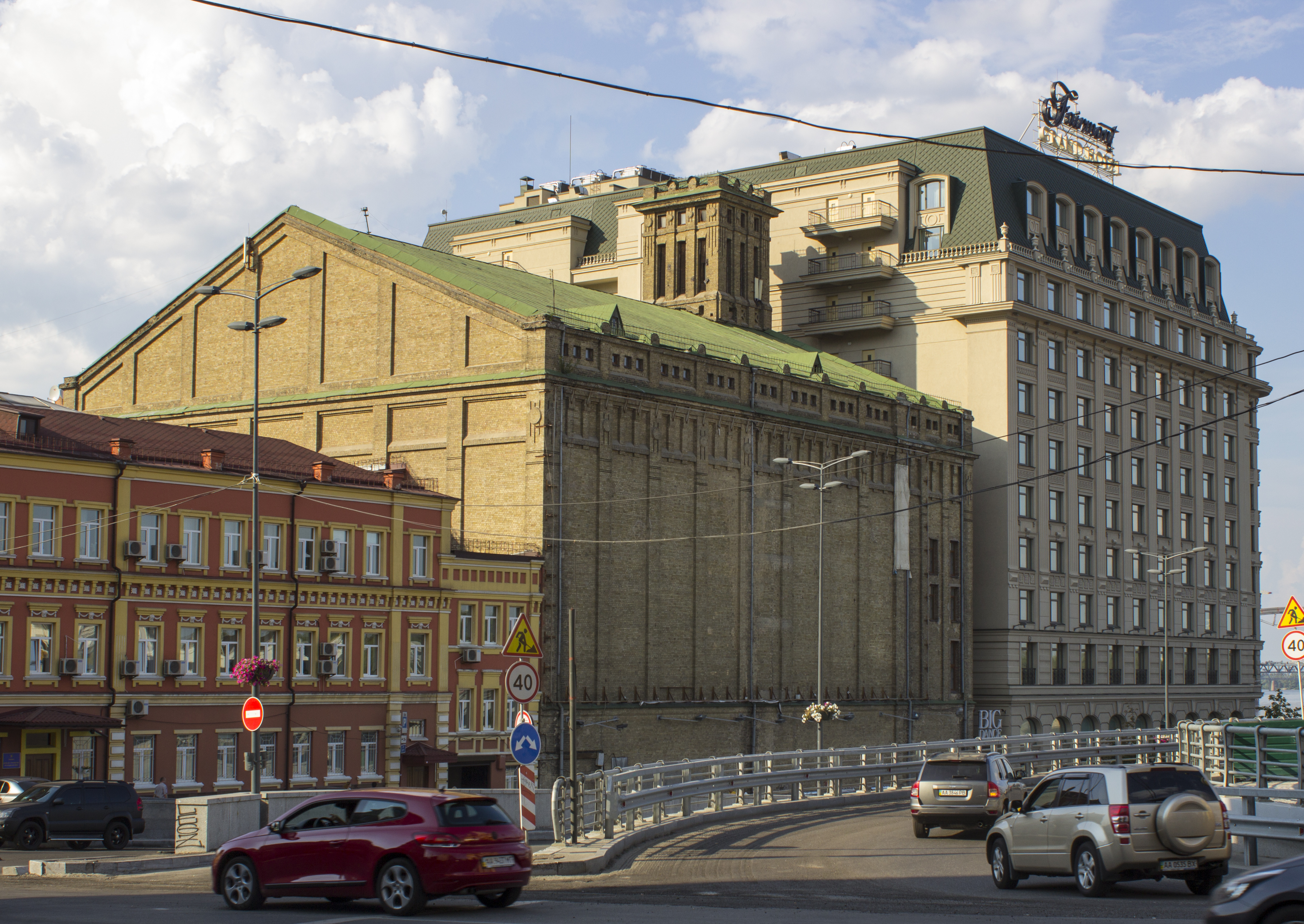 Елеватор Бродського, Київ, Боричів узвіз, 13